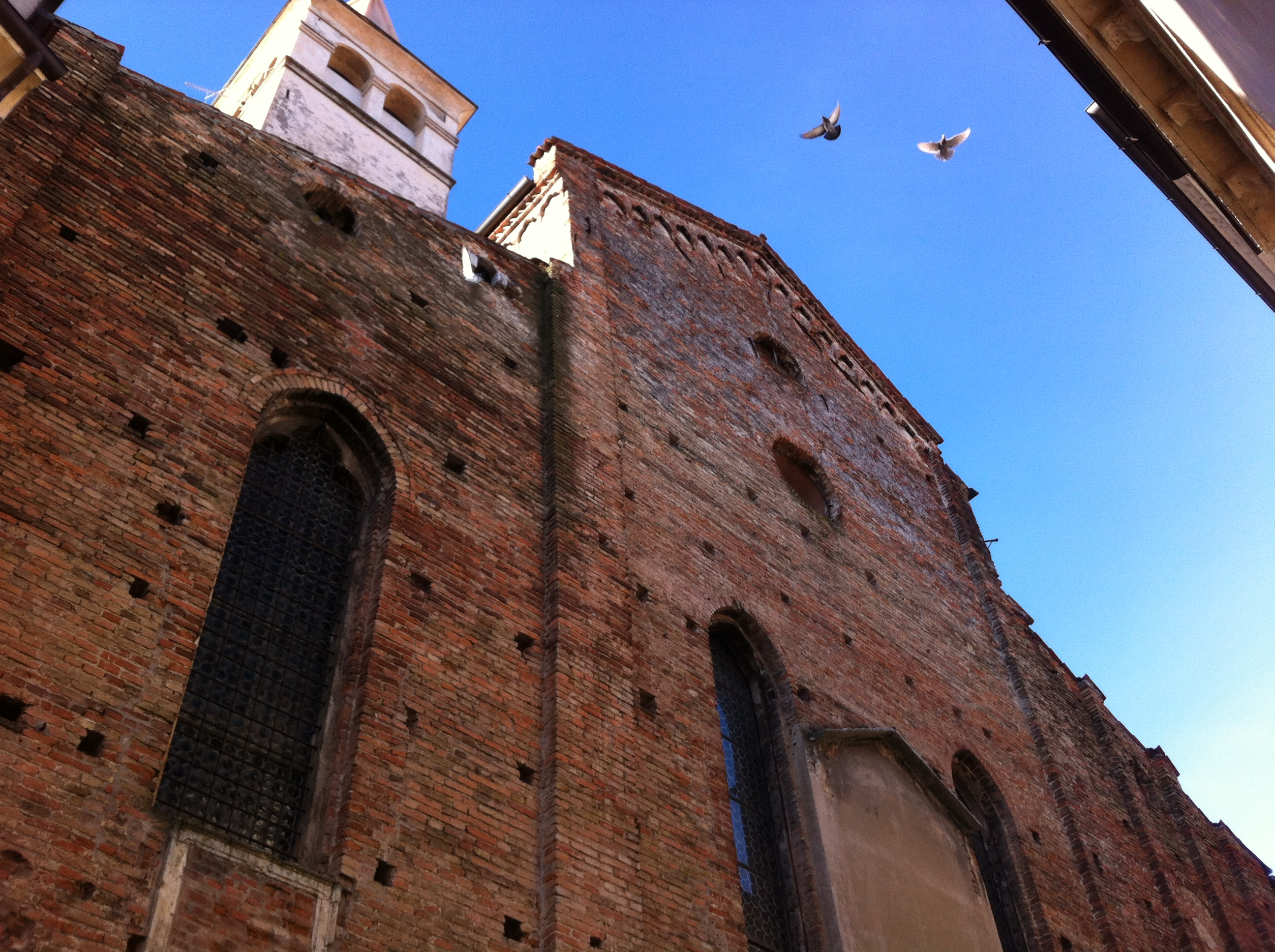 Chiesa di San Michele in Santa Maria in Foro dei Servi, Vicenza: vista del retro.